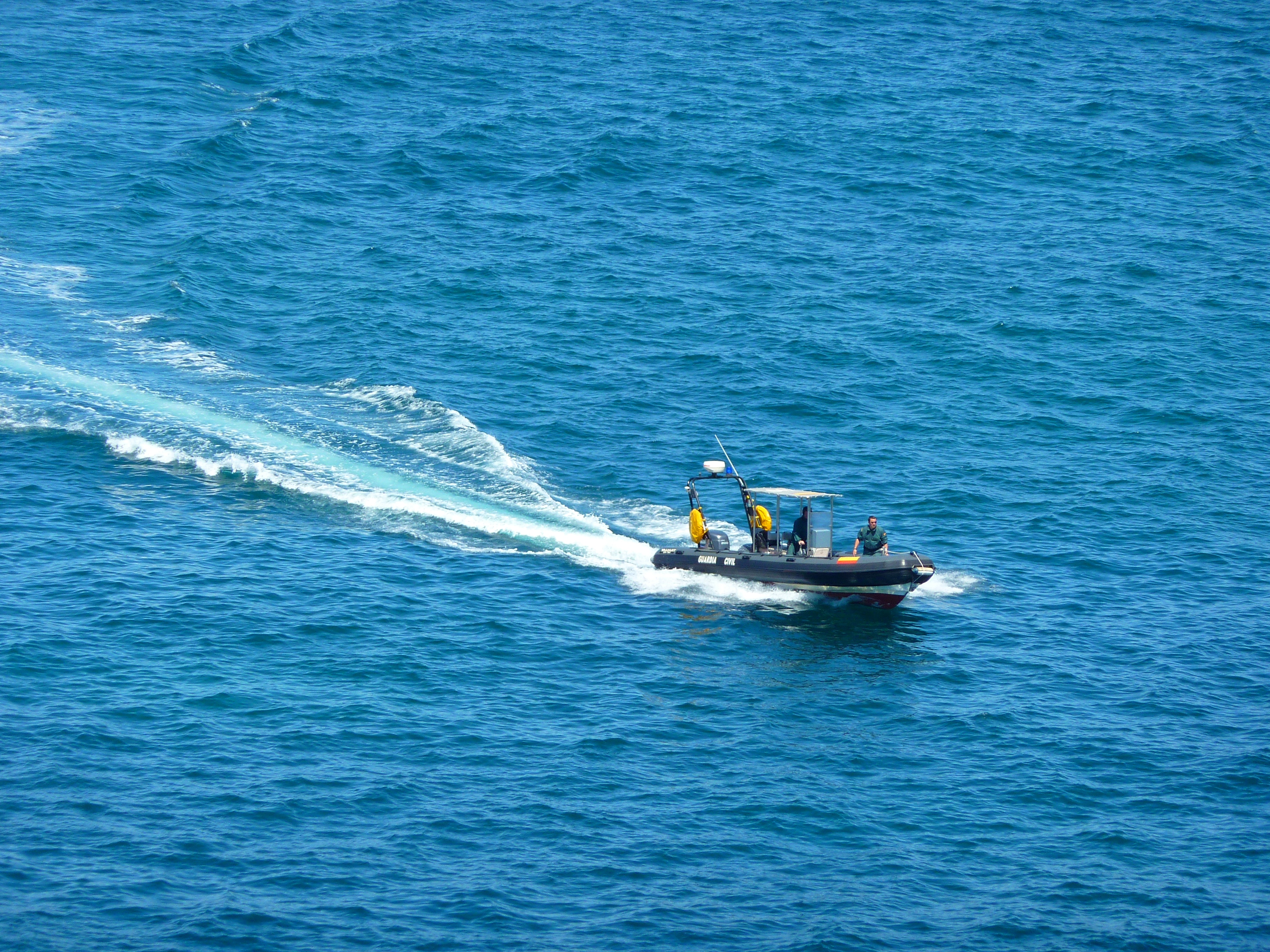 Lancha semirrígida del Servicio Marítimo de la Guardia Civil.